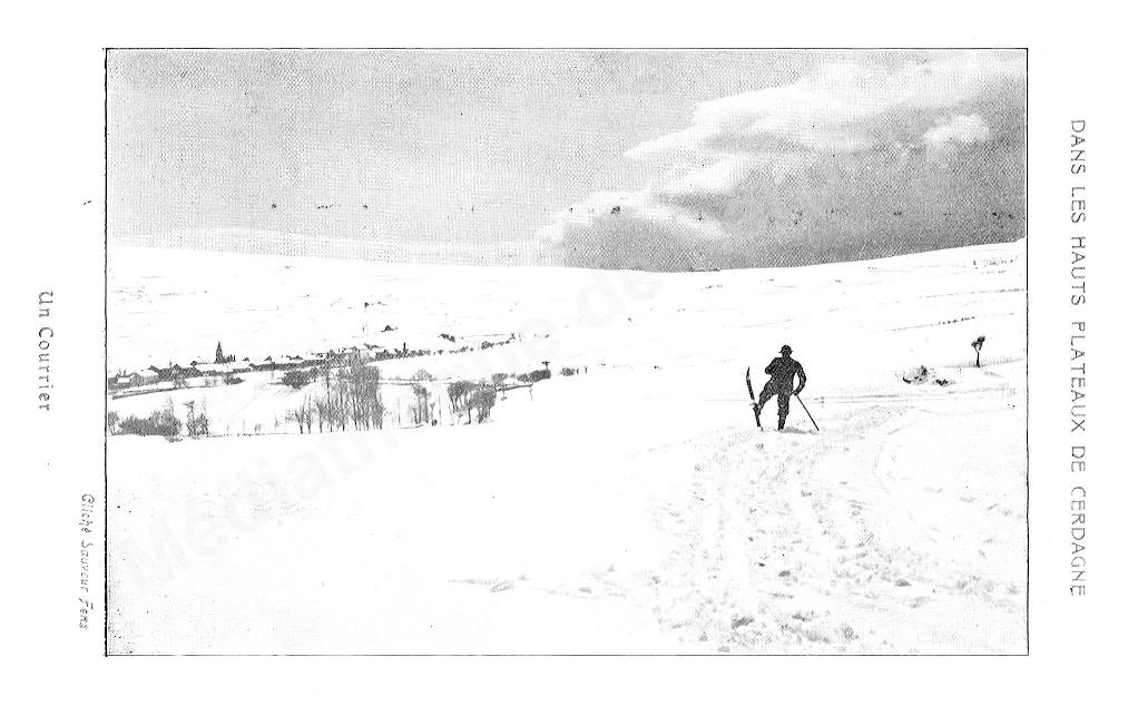 Dans les hauts plateaux de Cerdagne, un courrier.